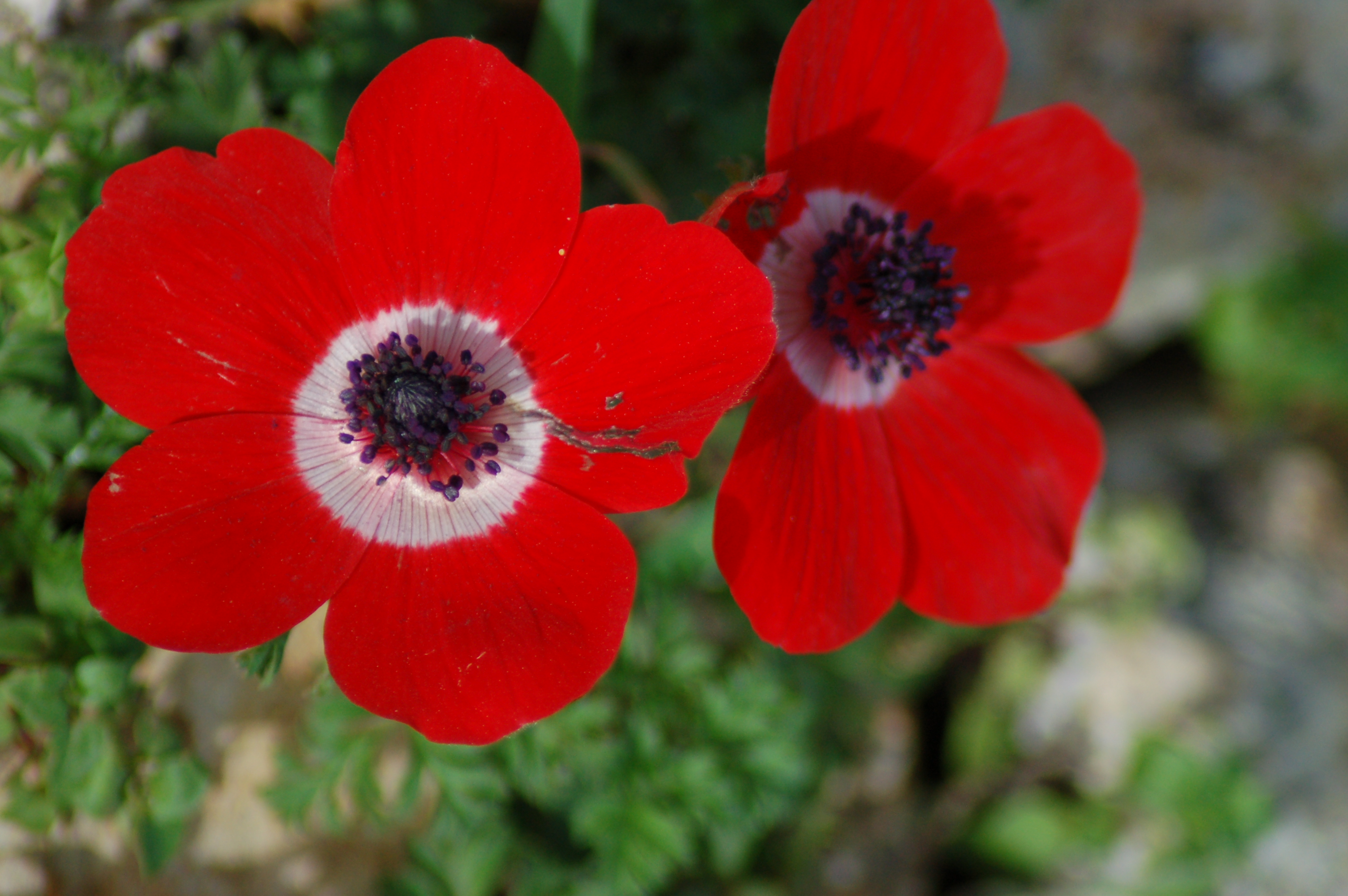 פארק הכרמל Haifa